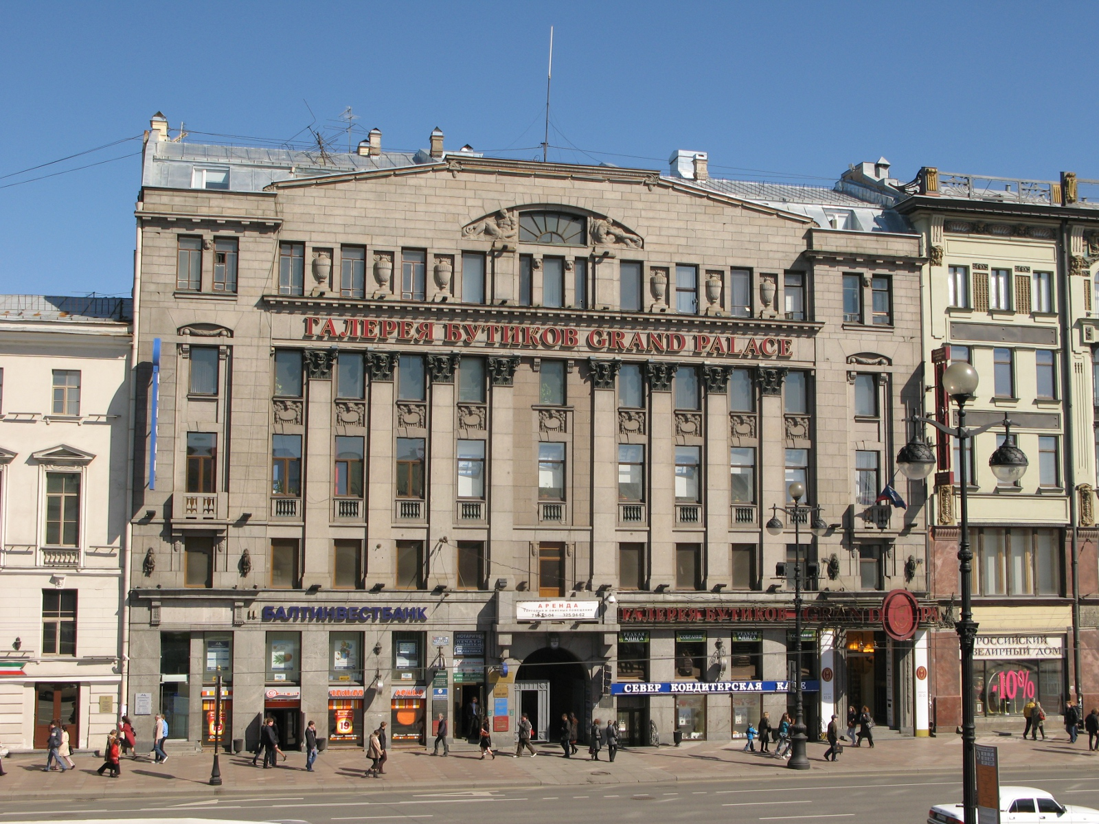 Невский пр., д.44, вид с галереи Гостиного двора